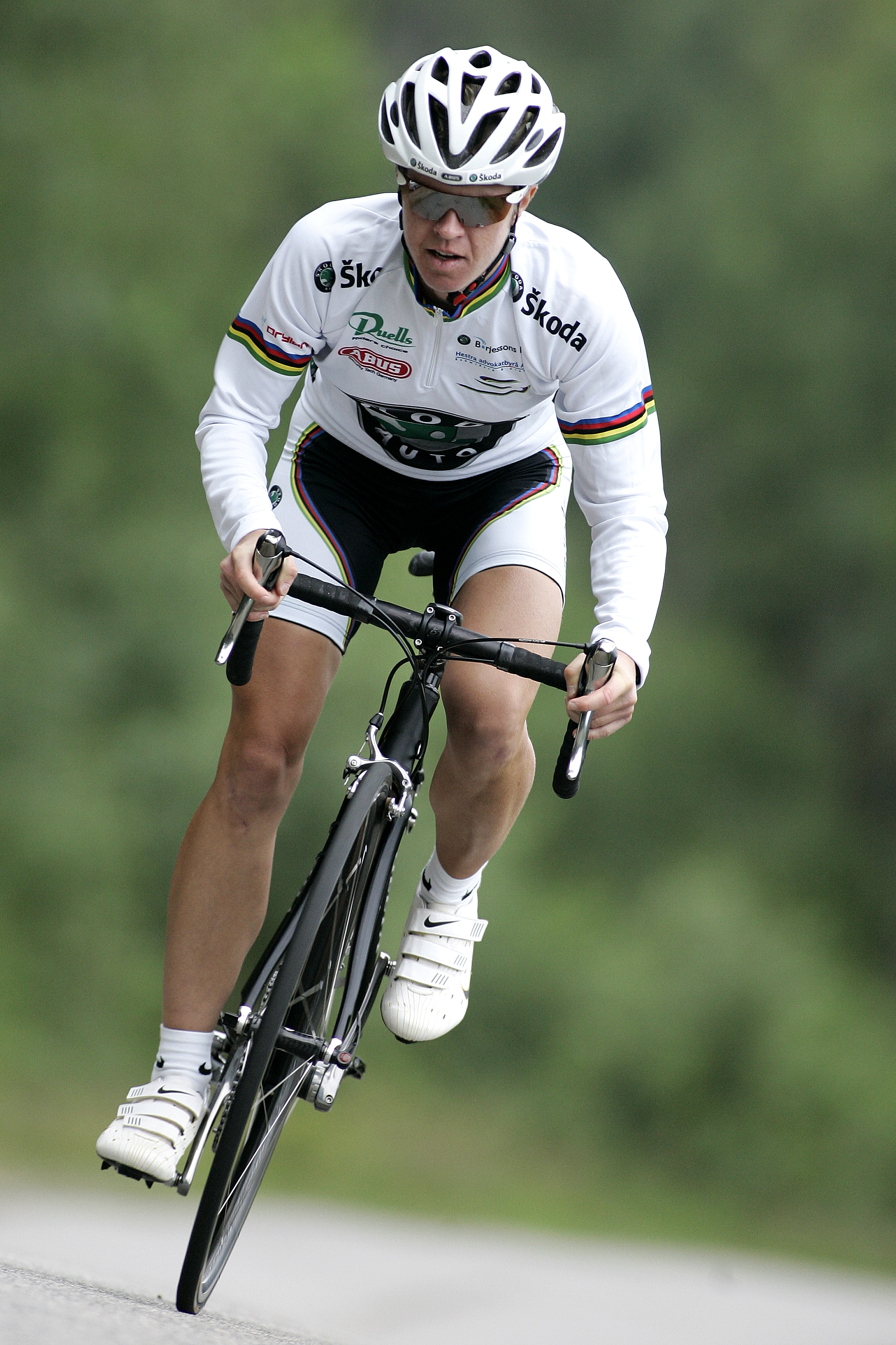 Landslagscyklisten Susanne Ljungskog i ett reklamfoto för Škoda Auto.